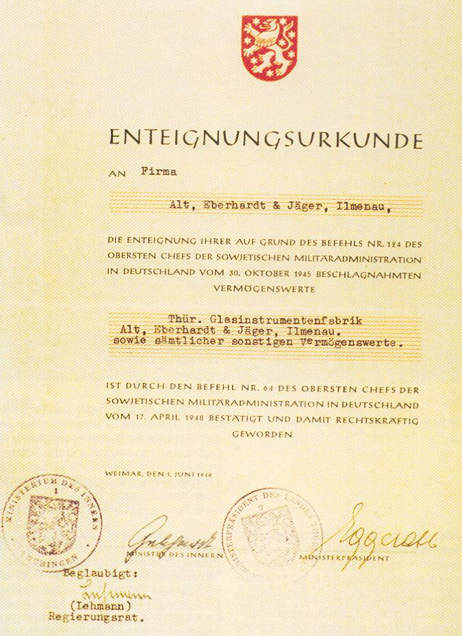 Enteignungsurkunde für die Thüringische Glasinstrumentenfabrik Alt, Eberhardt & Jäger